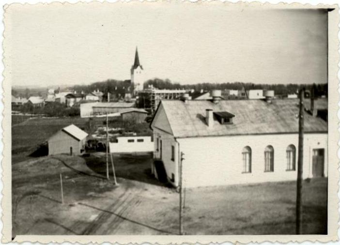 Keila kino vanal fotol